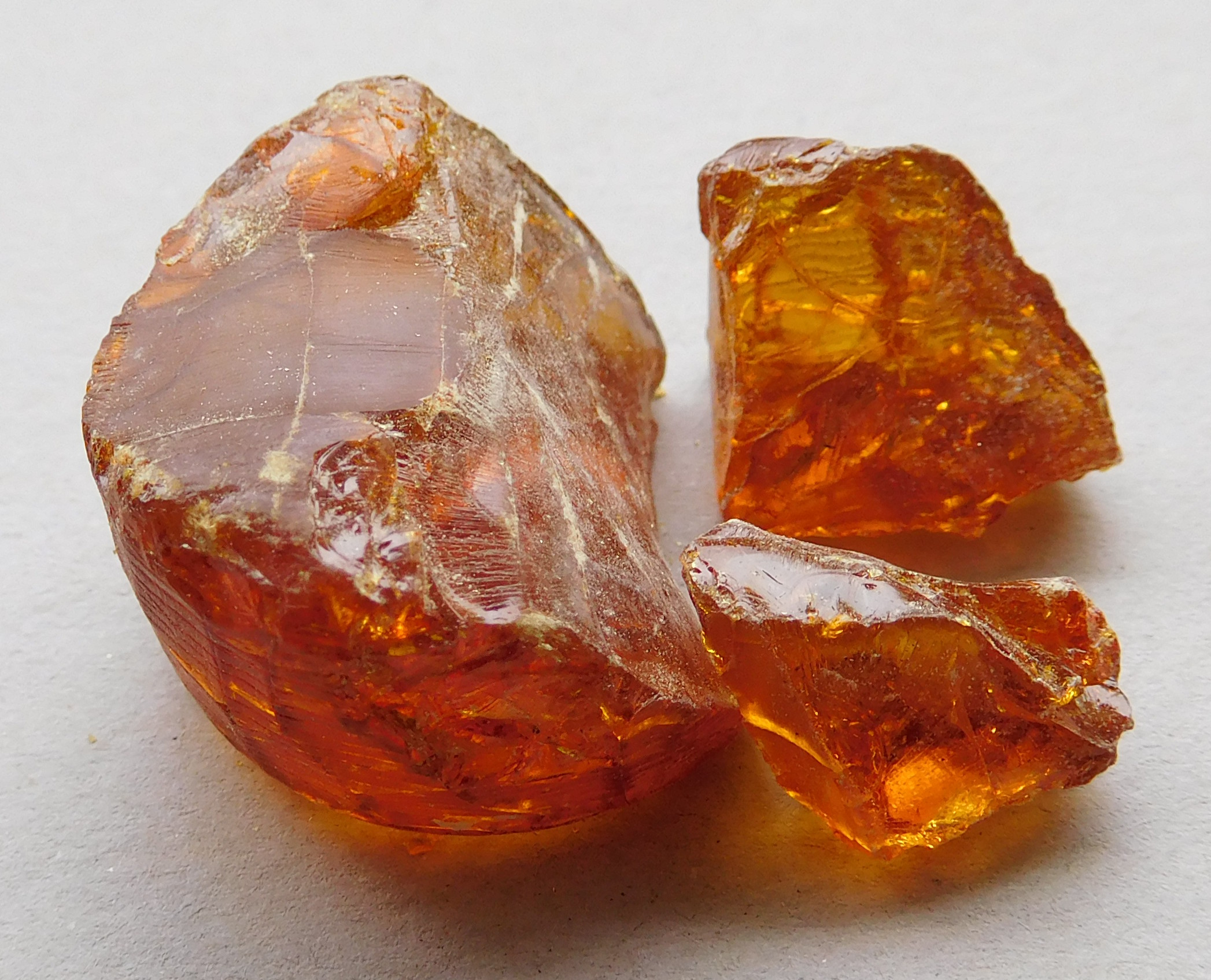 Bloc de colophane pour violon.